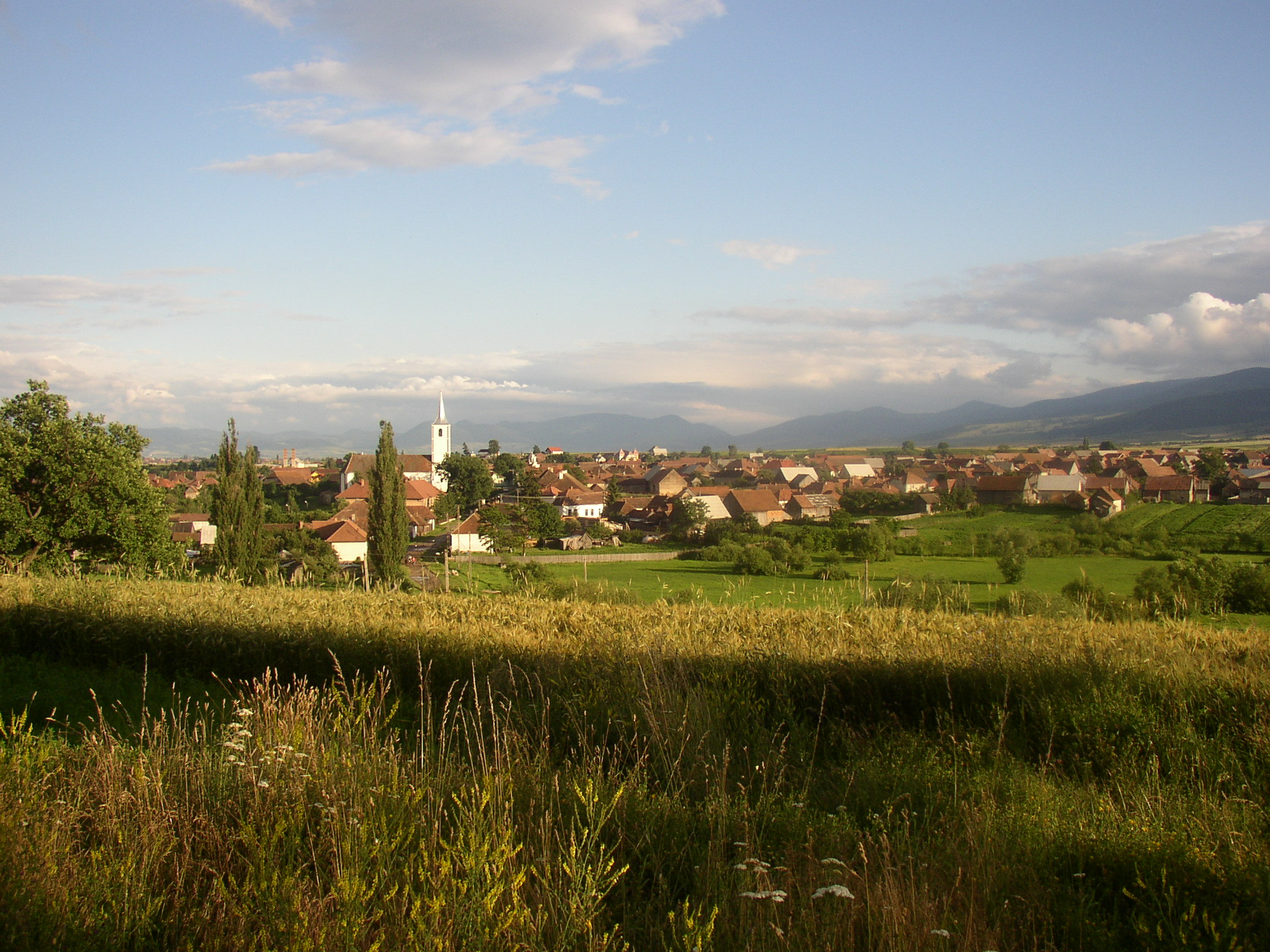 Szekely village, Erdely, Hargita, Romania